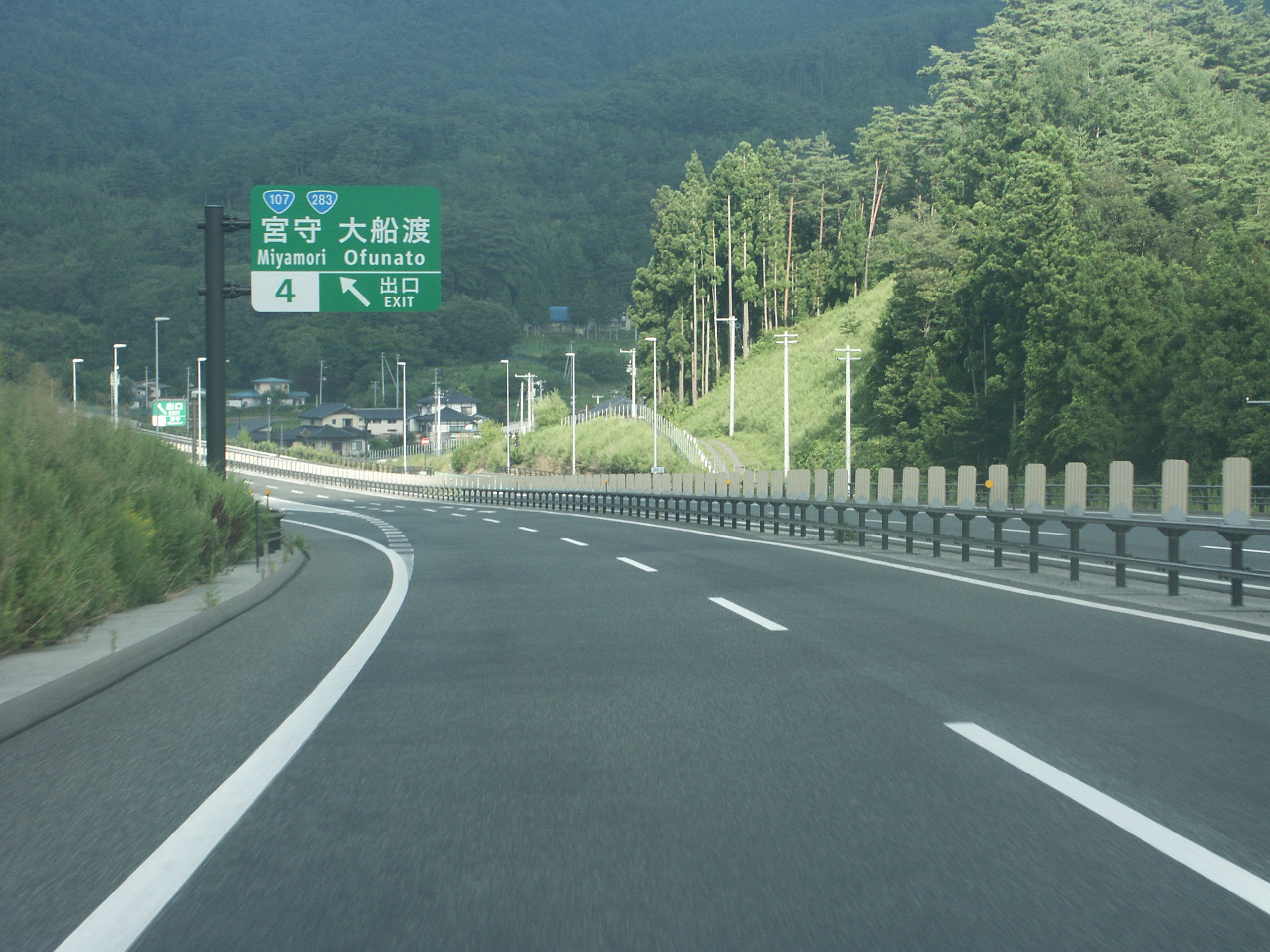 釜石自動車道 宮守IC花巻JCT方面側出口付近